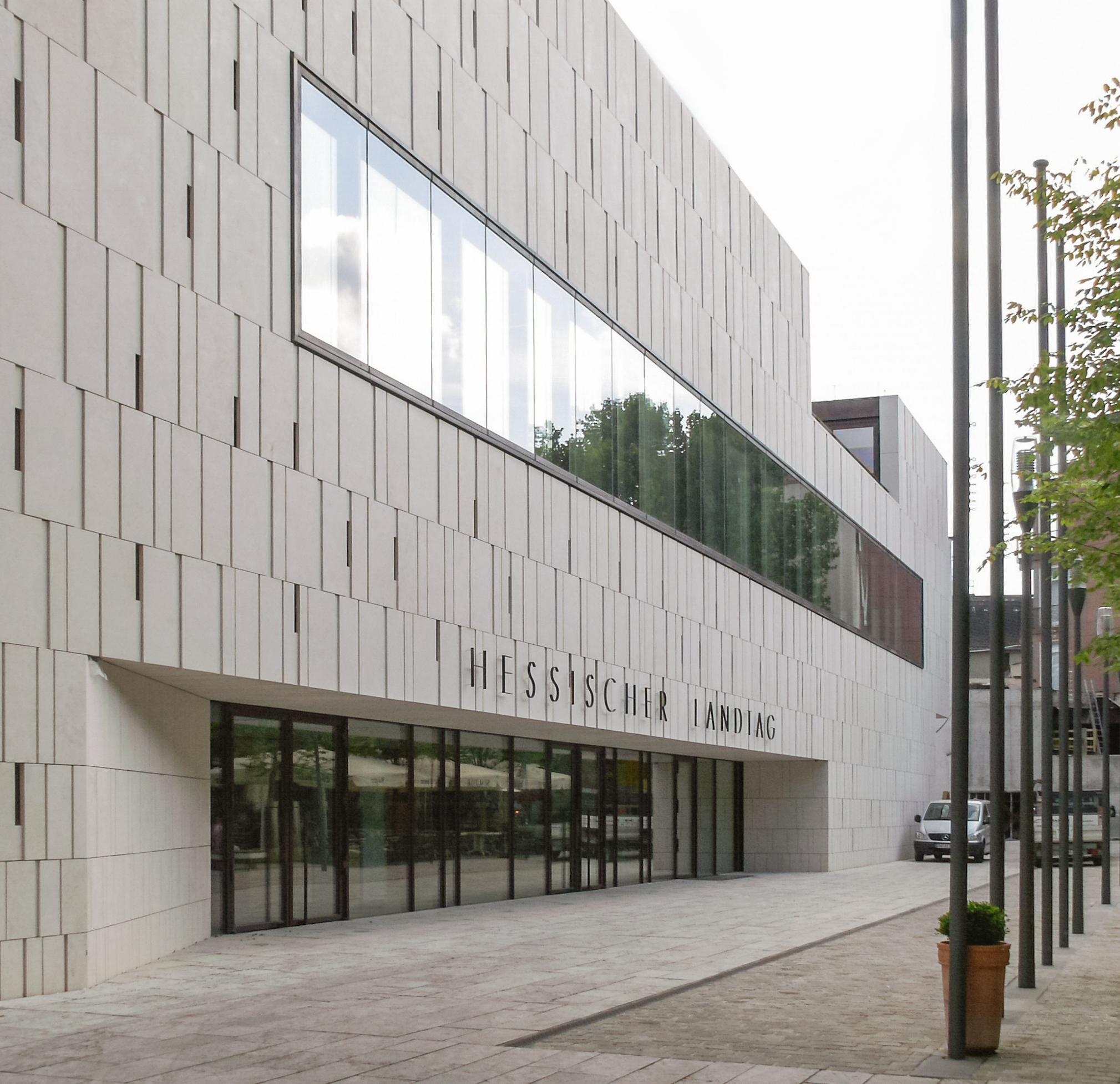 Hessischer Landtag nach langem Umbau mit neuem Eingang von der Grabenstraße Fertigstellung im Jahr 2008